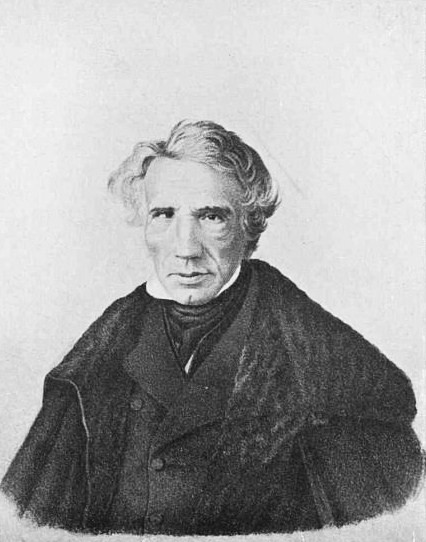 Александр Скарлатович Стурдза (1791—1854)